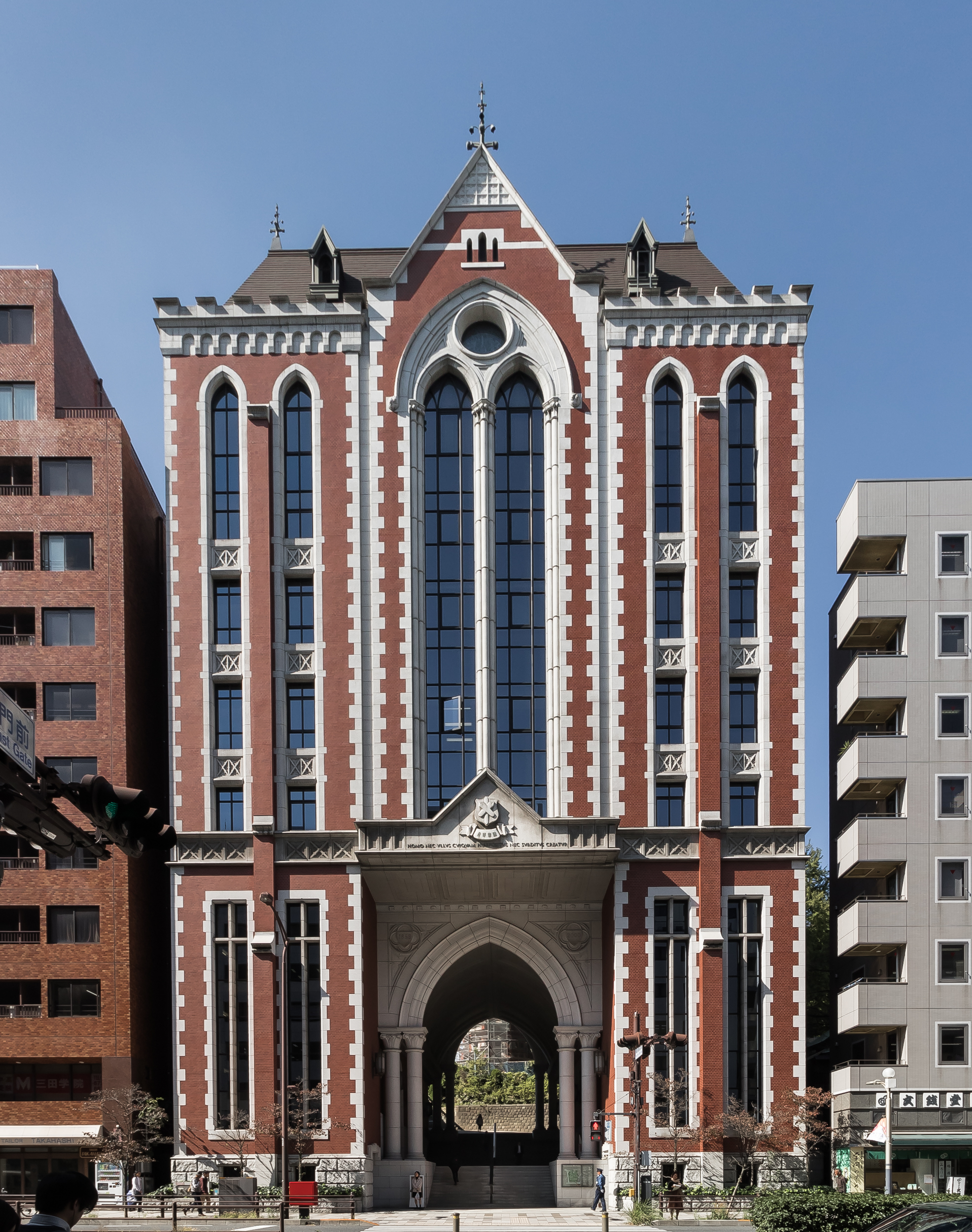 慶応義塾大学、三田キャンパス。東門。